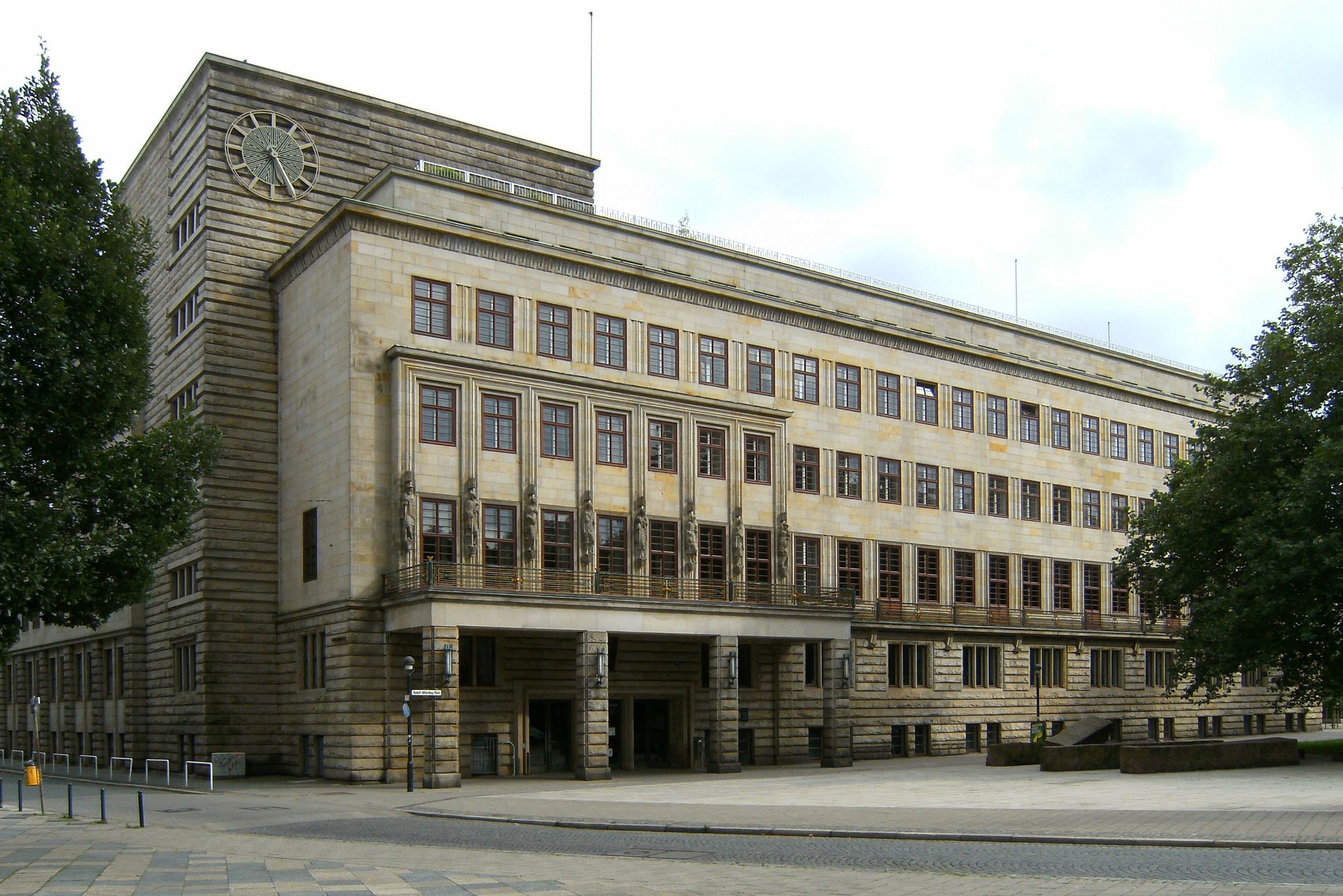 Nordwollehaus, Haus des Reichs in Bremen, Rudolf-Hilferding-Platz 1.Das abgebildete Objekt ist ein geschütztes Kulturdenkmal in der Freien Hansestadt Bremen, mit der Nr. 0290 beim Landesamt für Denkmalpflege registriert.